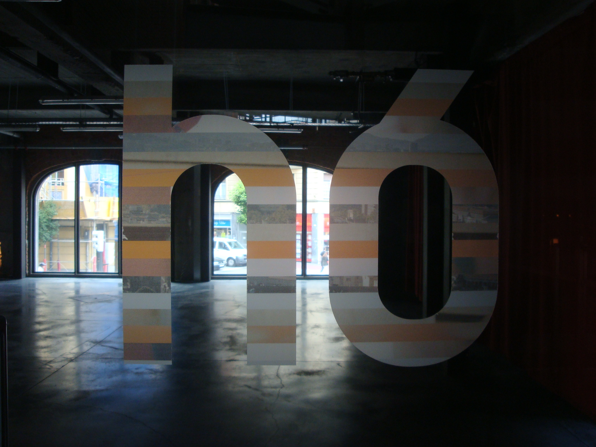 Centre culturel et de loisirs Alhondiga, Bilbao, P. Starck